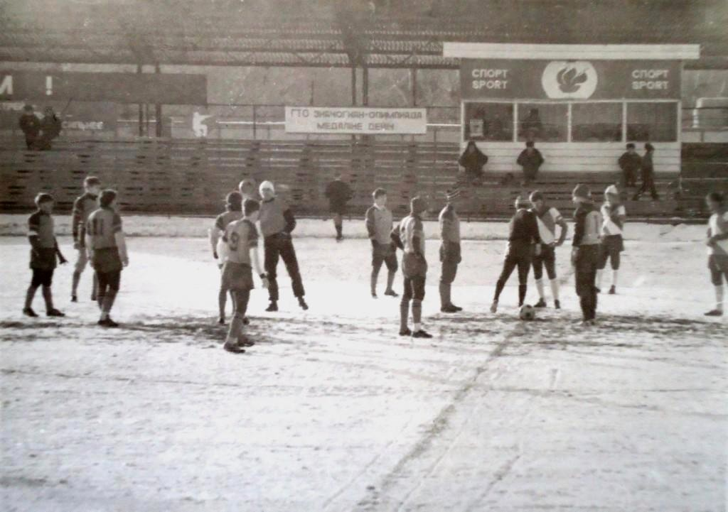 Вторая низшая лига, 8 зона. Команда "Кокшетау" на левой половине поля. Игроки слева направо: С.Фенько, О.Кореев, Ю.Оберемко (№11), В.Шторм (Фотовенко), К.Горбов (№9), Б.Куриченков (вратарь), Ю.Гладких, Н.Сулейменов, А.Мазлоев. Отсутствуют в кадре В.Семёнов и А.Карпов